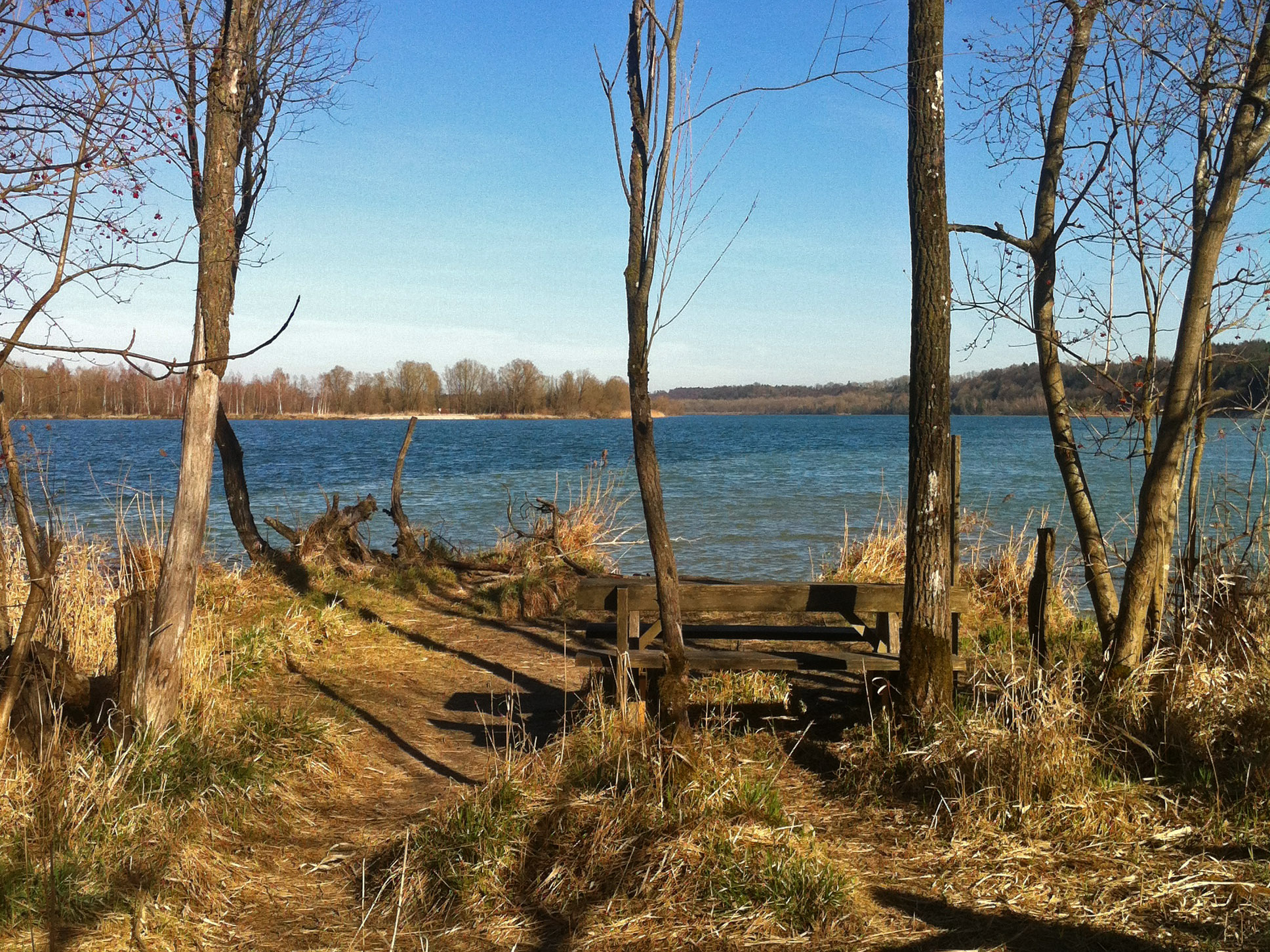 Innspitz mit Blick auf den Zusammenfluss von Inn (links) und Salzach (rechts) und einem Rastplatz zum Verweilen und Bestaunen dieses wundervollen Fleckchens.